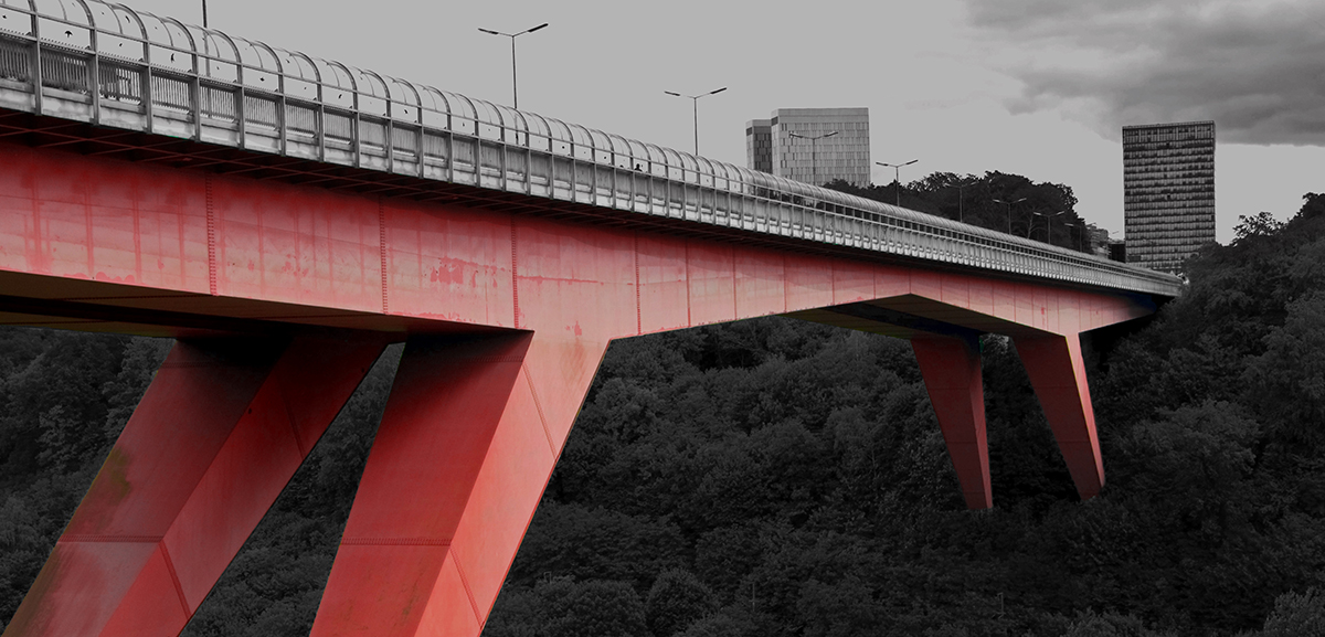 Die Großherzogin-Charlotte-Brücke ("Pont Grand-Duchesse Charlotte", im Volksmund Rout Bréck, "Rote Brücke" genannt) ist eine Stahlbrücke, die das Tal der Alzette in Luxemburg (Stadt) überspannt und das Europaviertel auf dem Kirchberg-Plateau mit dem Stadtzentrum Luxemburgs verbindet.